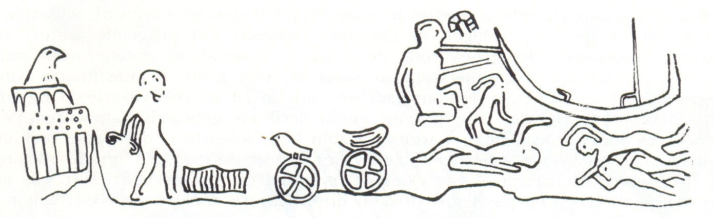 De rotsinsciptie van Jebel Sheihk Suleiman